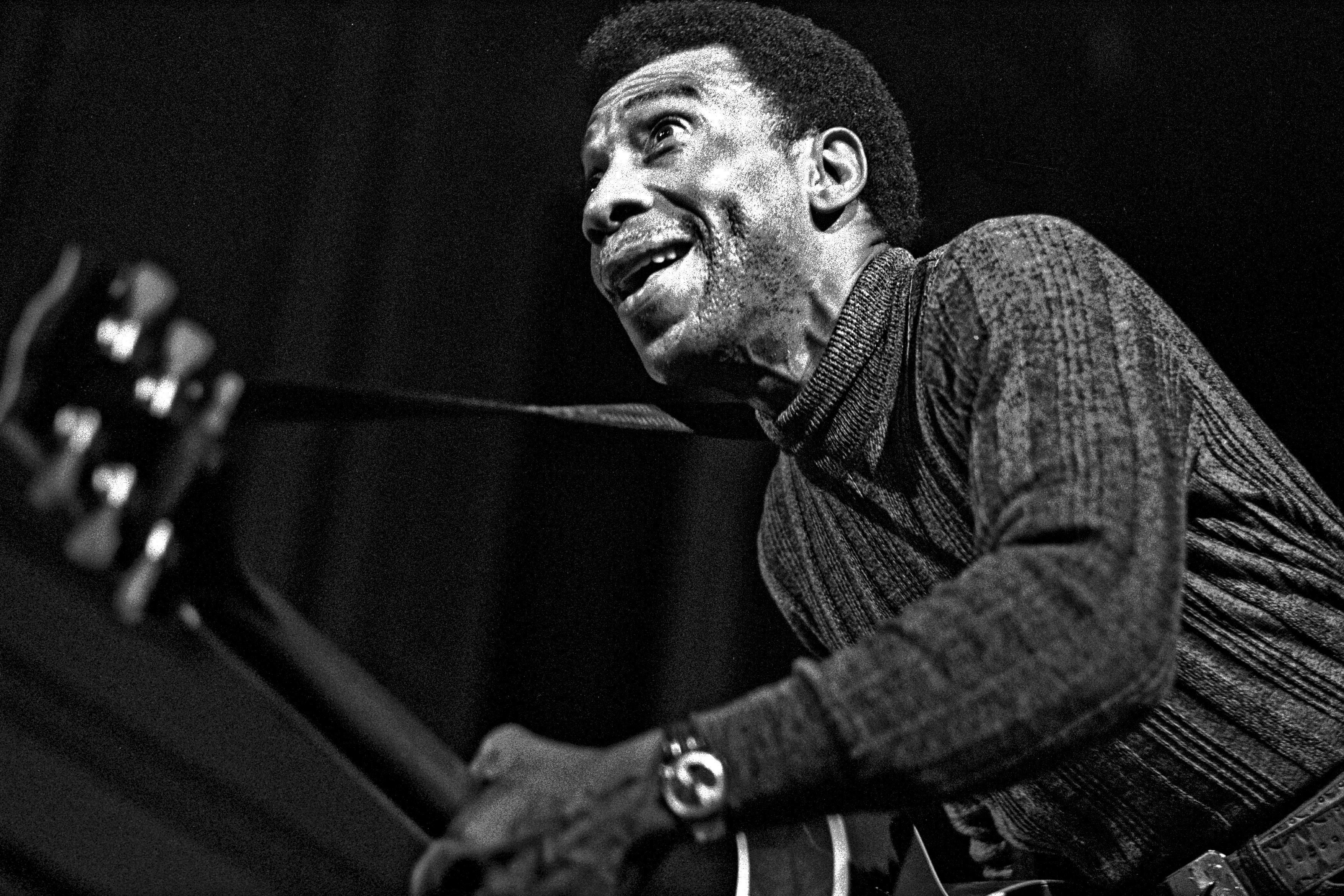 T-Bone Walker beim American Folk Blues Festival in Hamburg, Musikhalle, März 1972